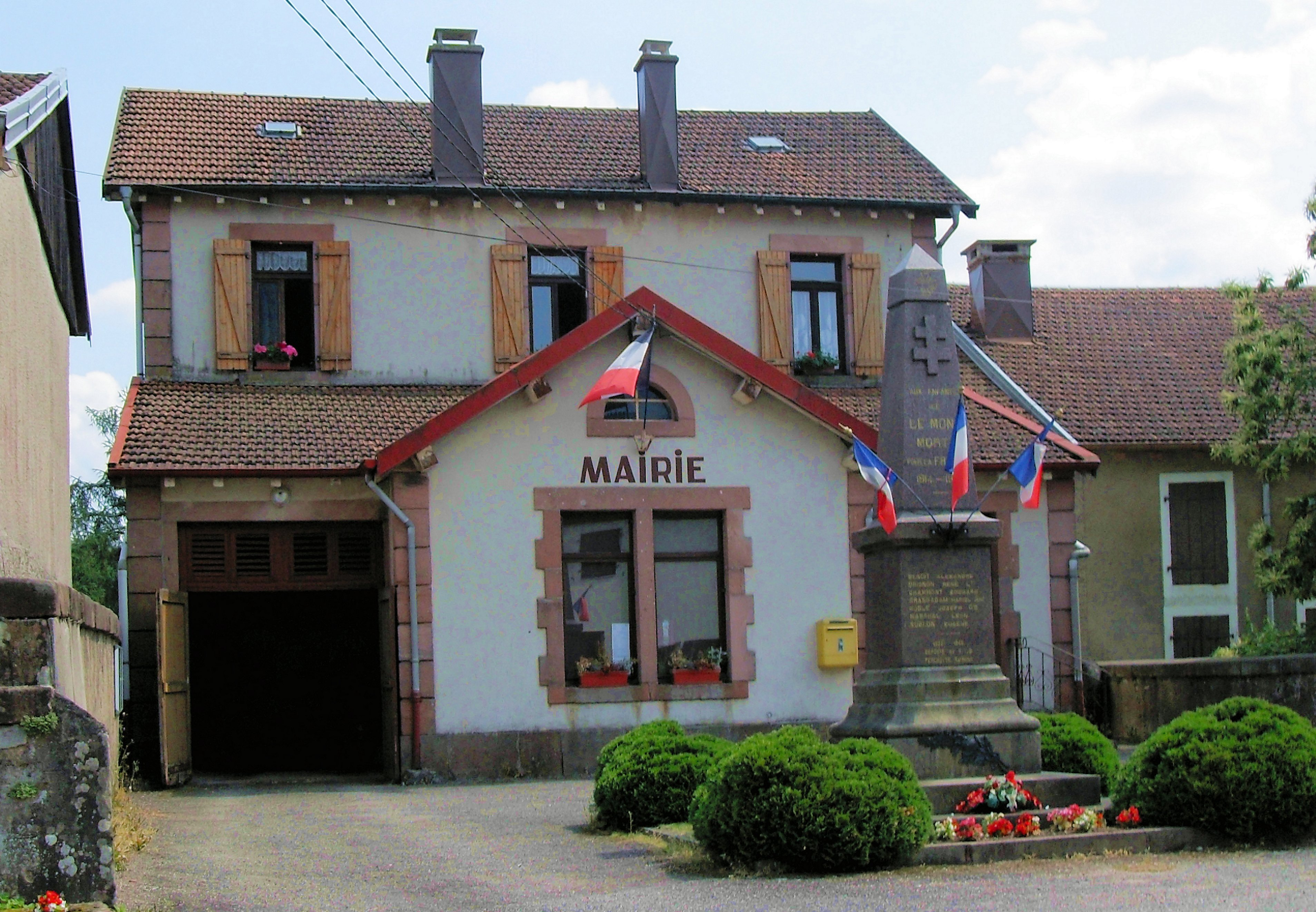 La mairie du Mont